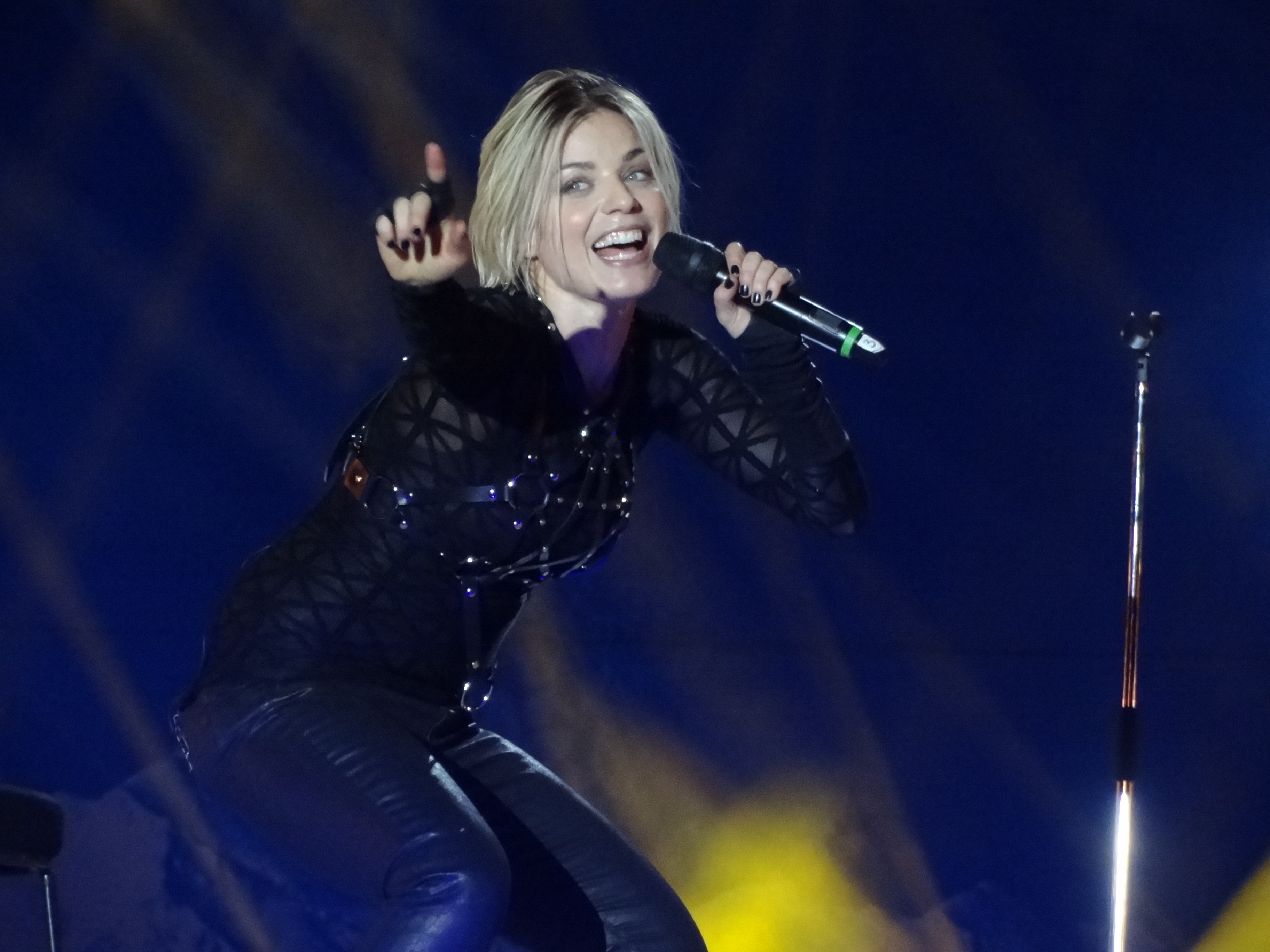 20 февраля, Сочи, Олимпийский парк. GALA Популярная итальянская певица. Поёт на английском. Наиболее известны её хиты “Freed From Desire”, “Let a Boy Cry” и “Come Into My Life”.